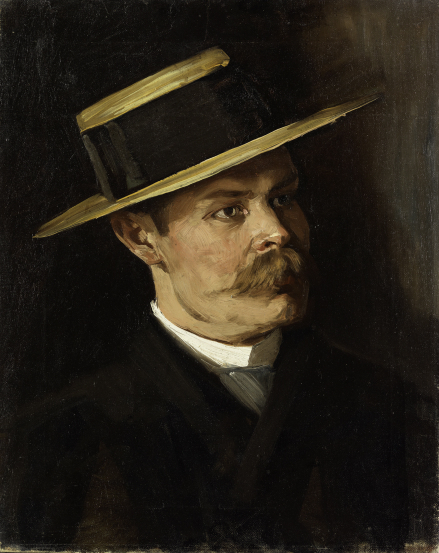 Maalikunstnik Tõnis Grenzsteini teos